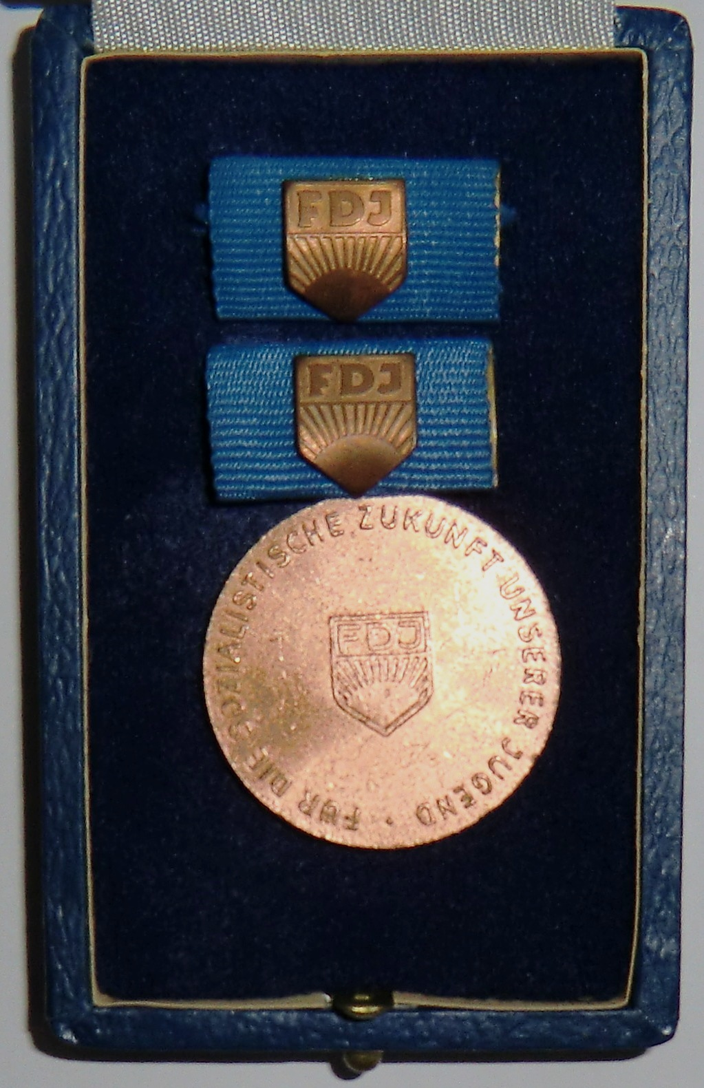 Artur Becker Medaille in Bronze (Rückseite) aus dem Jahr 1976, Privatbesitz, eigene Aufnahme